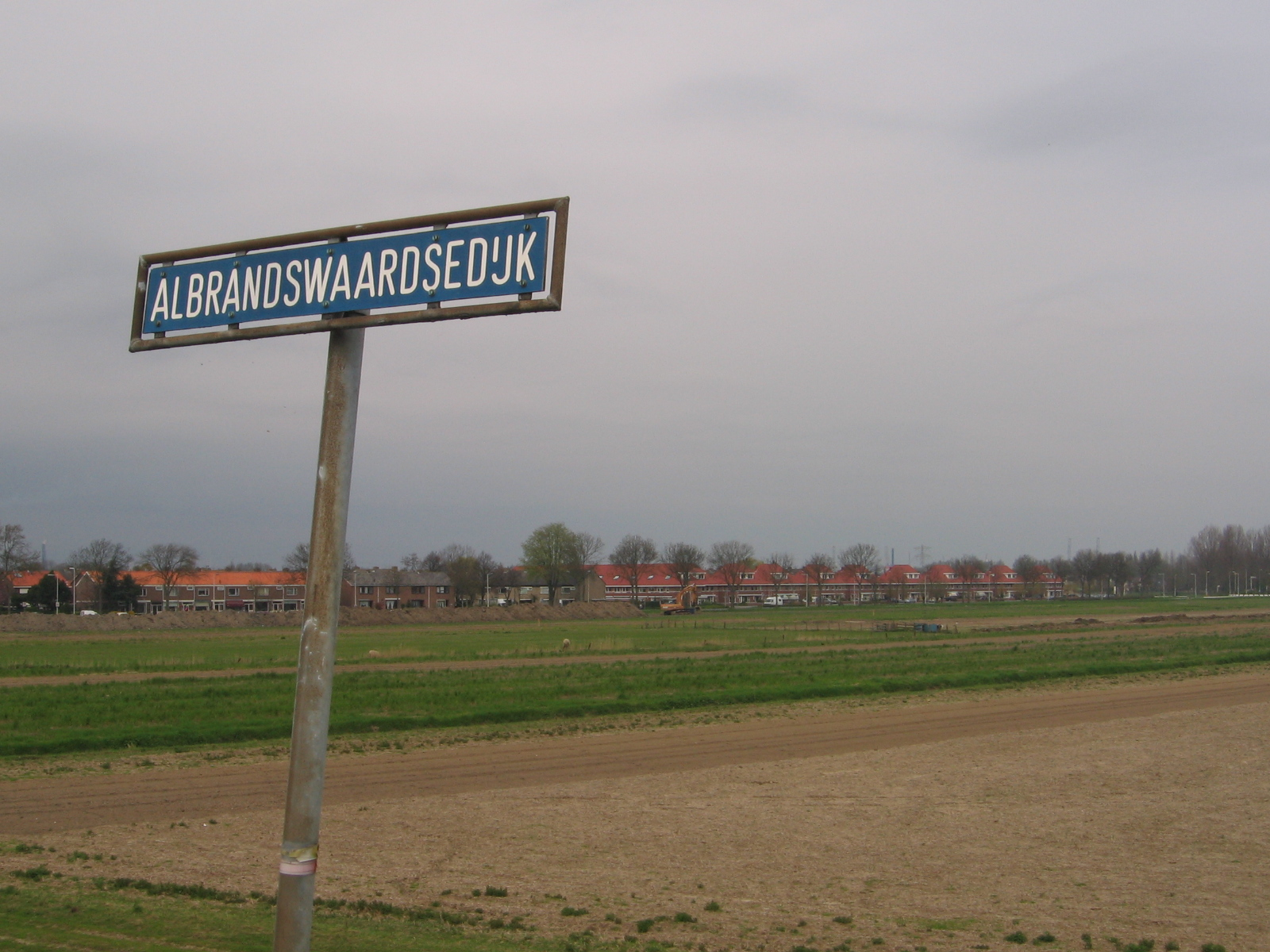 Poortugaal, Albrandswaard, 23 april 2006